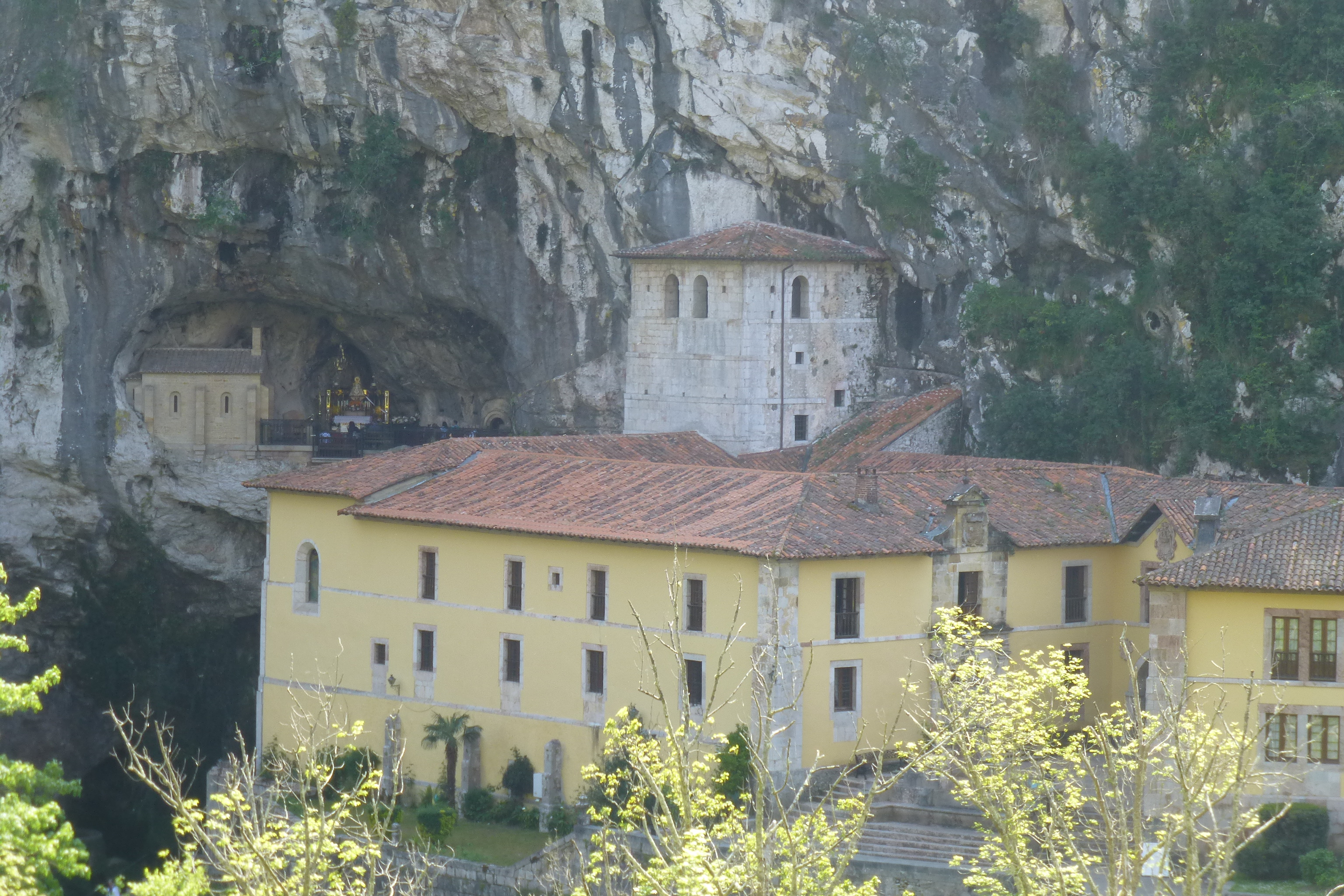 Vista general de la Santa Cueva del Santuario de Covadonga en Onis, Asturias (España)